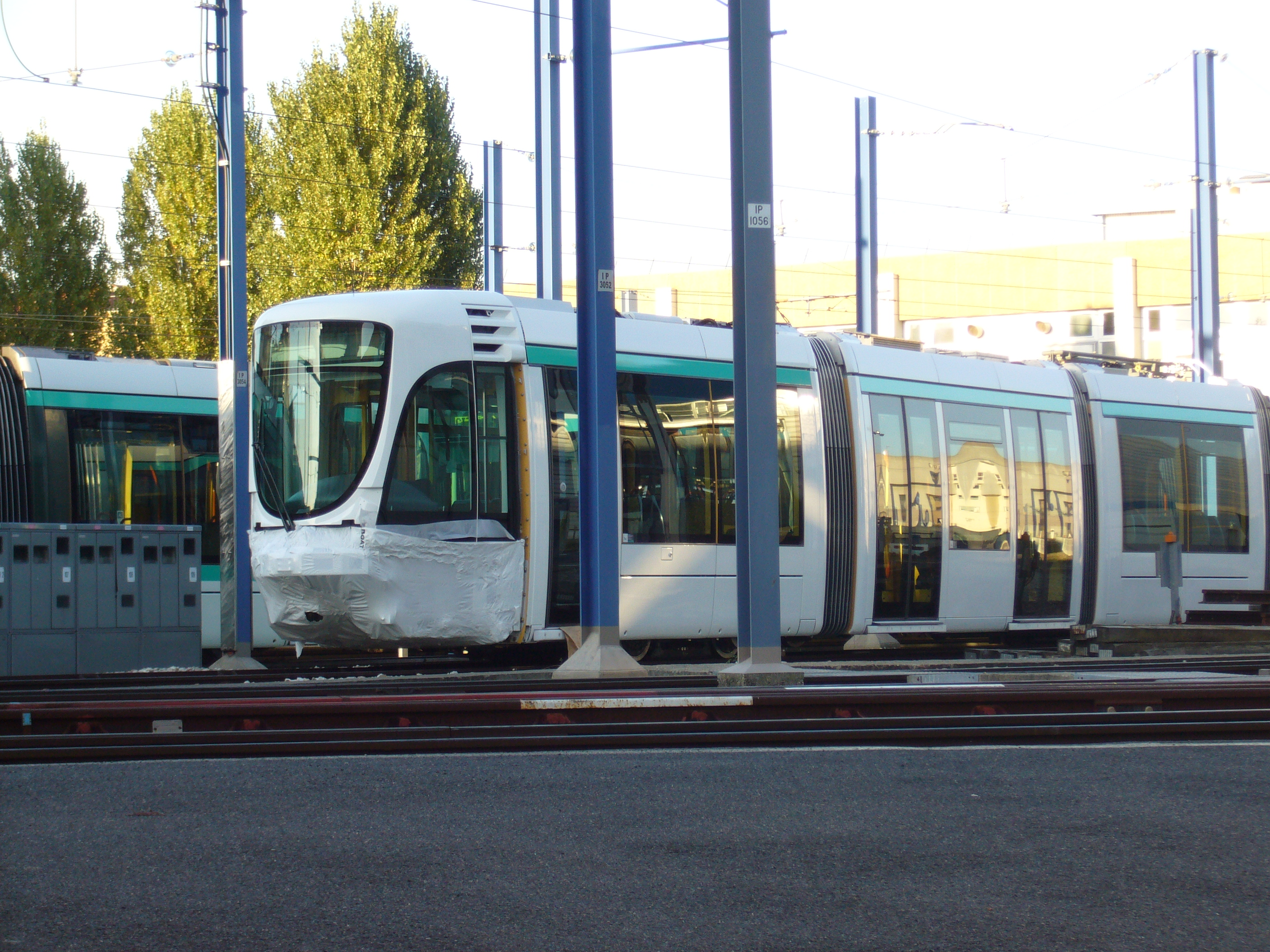 Une rame Citadis fraichement livrée pour le prolongement de la ligne T2 du tramway d'Île-de-France à la Porte de Versailles